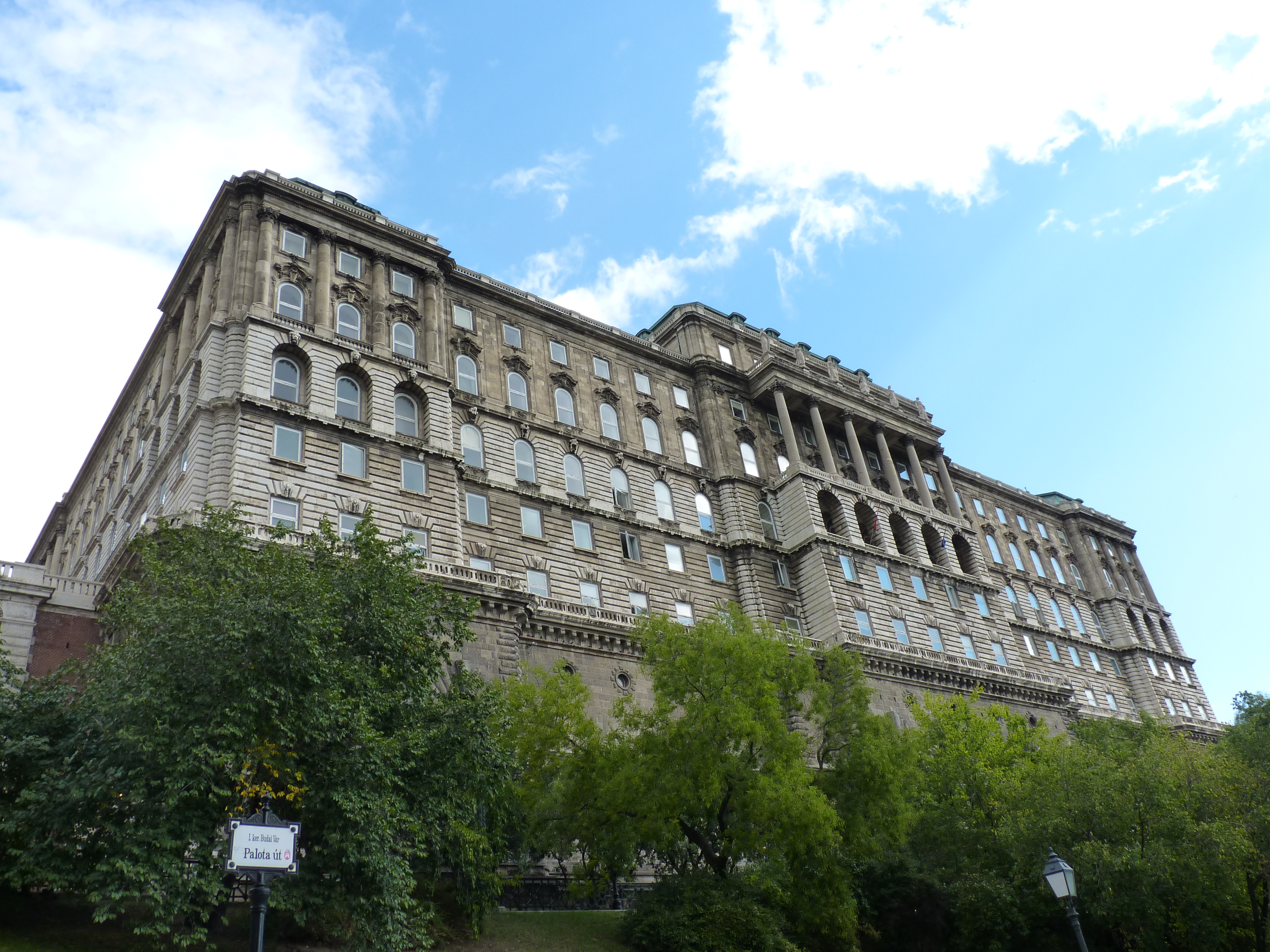 Budavári Palota (A, B, C, D, E, F épület) This is a photo of a monument in Hungary. Identifier: 138